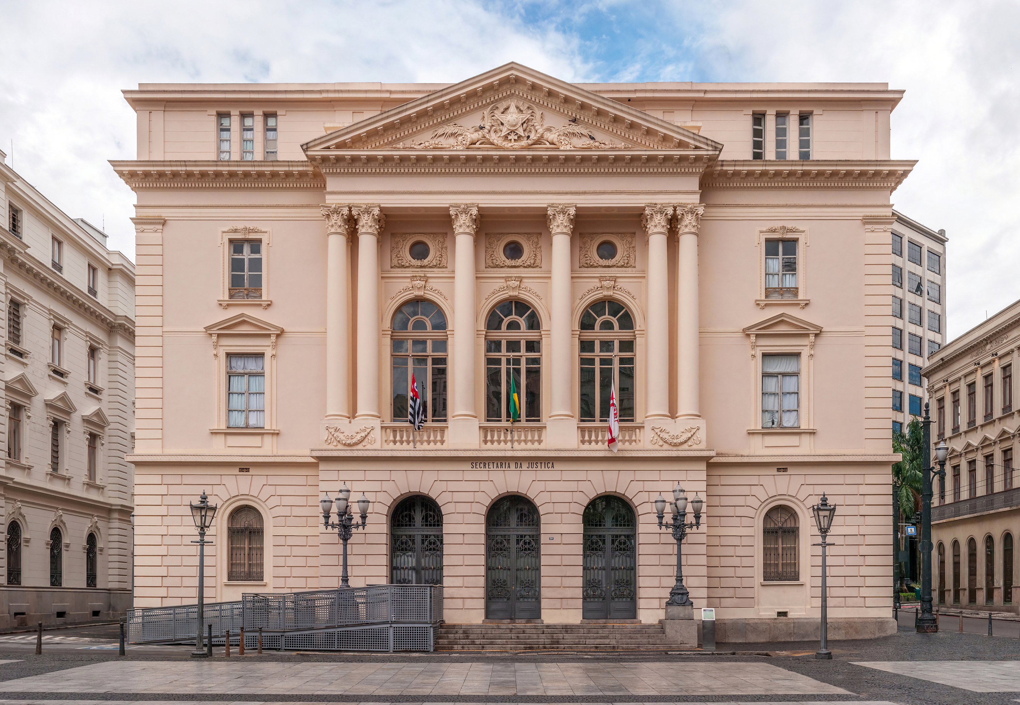 Vista lateral esquerda dos dois antigos edifícios das Secretarias da Agricultura e da Fazenda, hoje Secretaria da Justiça e da Defesa da Cidadania do Estado de São Paulo, Páteo do Colégio